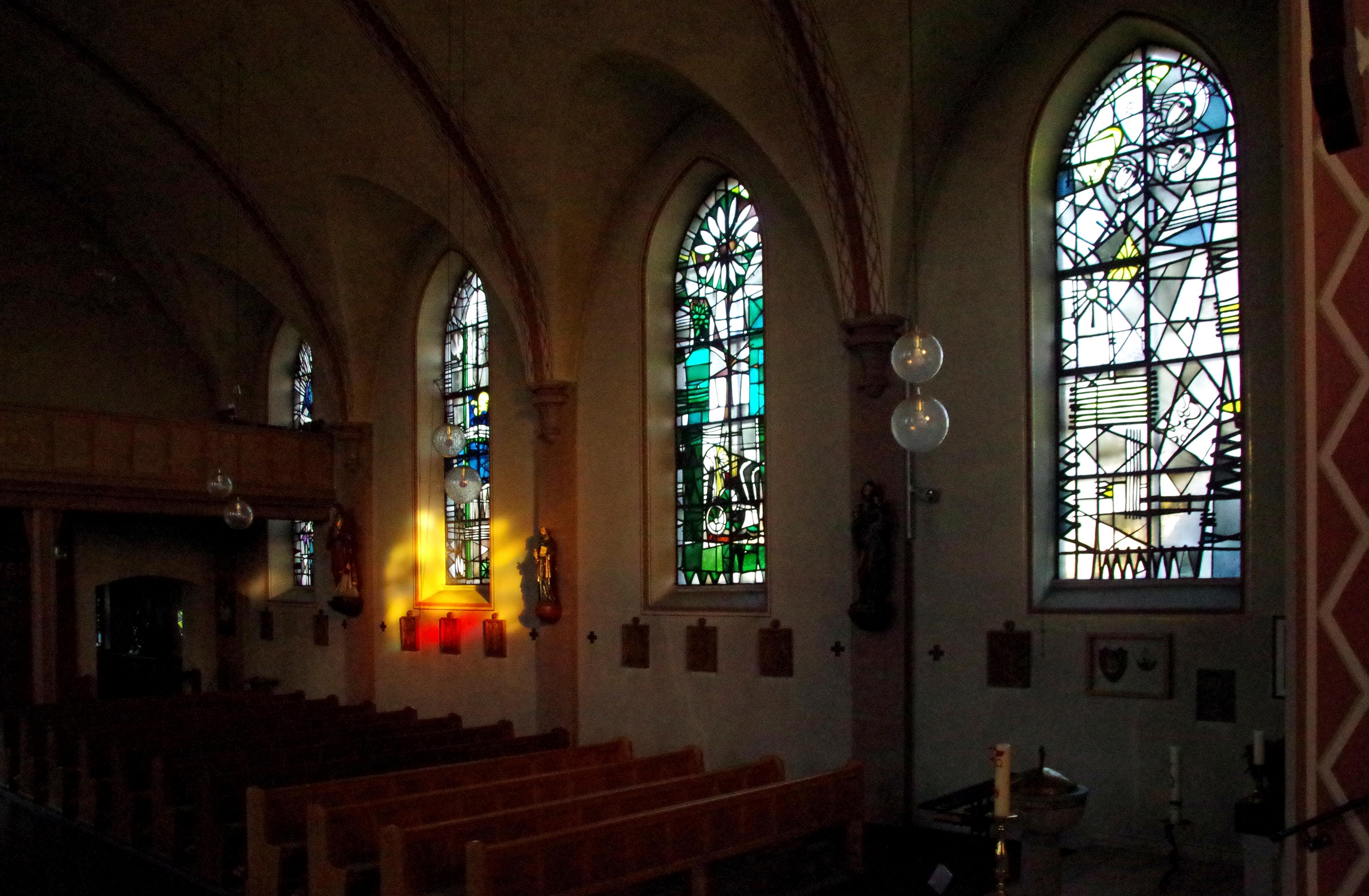 St. Peter und Paul (Kesternich), nördliche Fensterseite